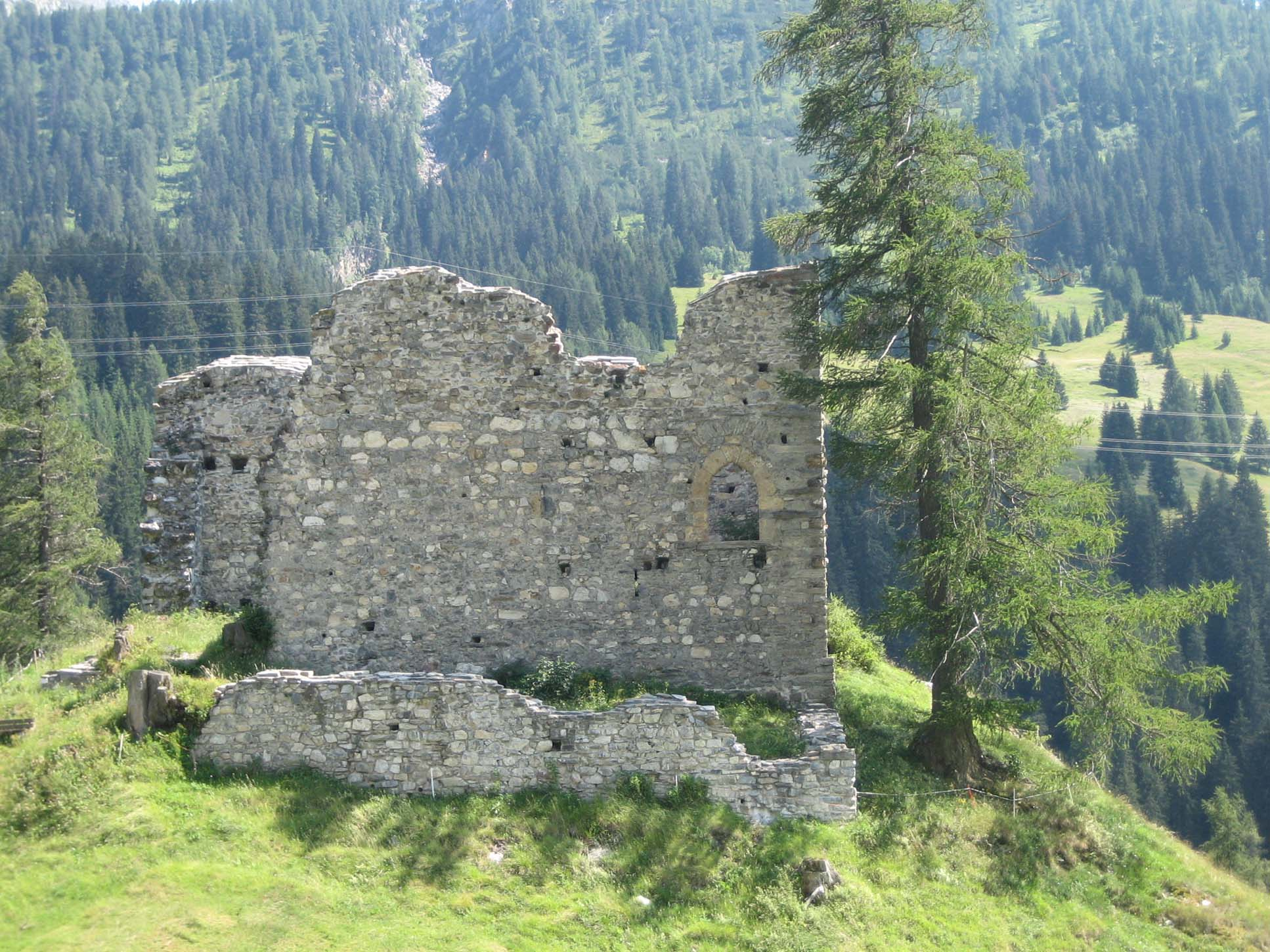 Nordseite